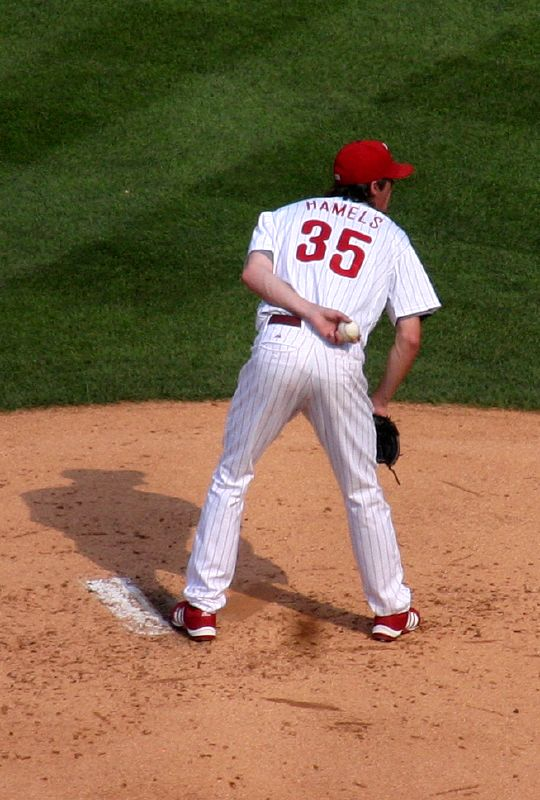 Cole Hamels 20:52, 16 November 2007 . . Old man gnar . . 540×800 (87 KB)